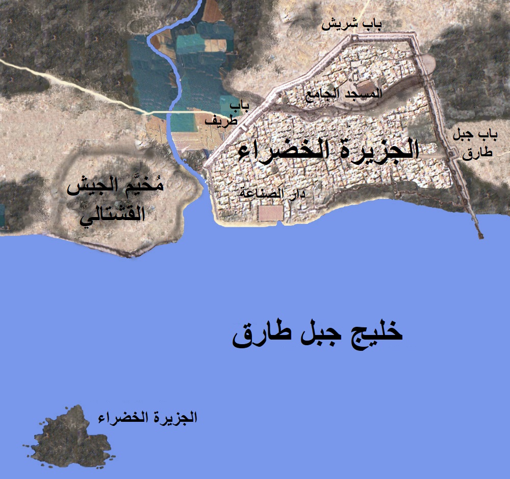 الجزيرة الخضراء في الأندلُس عندما كانت ما تزال في حوزة المُسلمين تحت راية مملكة غرناطة.